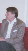 Hector Bianciotti, de l'Académie française.